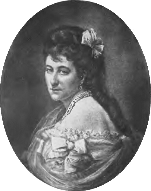 Iza z Tyszkiewiczów Tyszkiewicz (1836-1907)